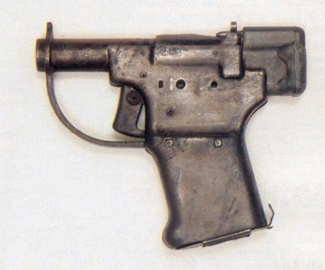 M1942 Liberator pistol